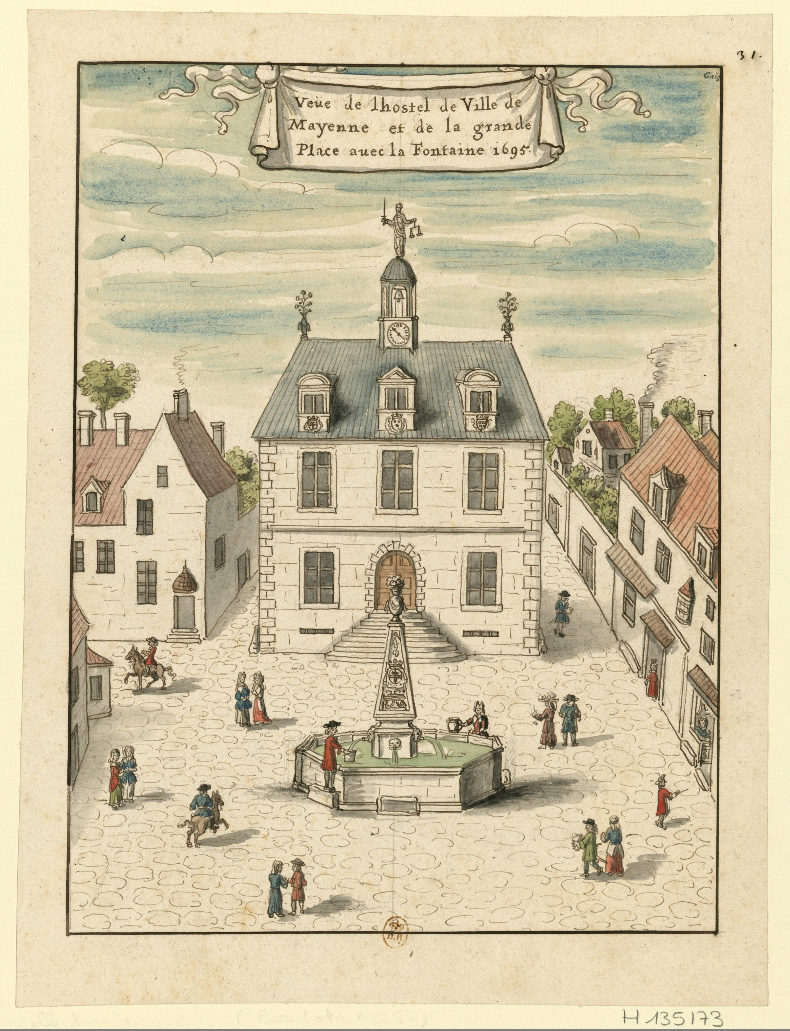 Veüe de l'hostel de Ville de Mayenne et de la grande Place avec la Fontaine.